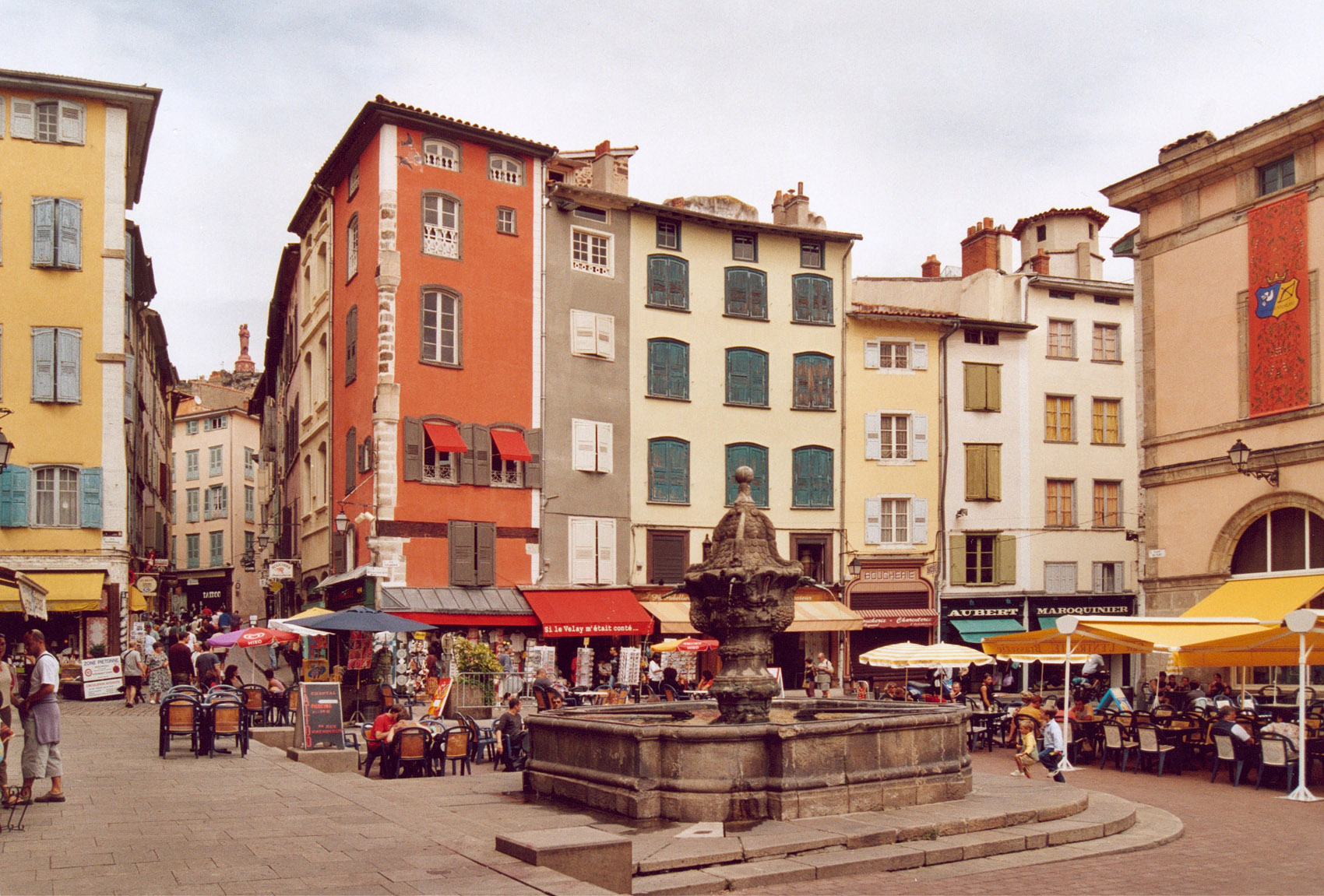 Place et fontaine. Le Puy-en-Velay, Haute-Loire, France